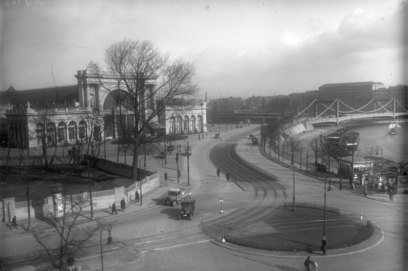 Ein Washington-Platz in Berlin ! Anlässlich der Wiederkehr des 200. Geburtstages des grossen amerikanischen Präsidenten George Washington hat das Preussische Staatsministerium den Platz vor dem Lehrter Bahnhof in "Washington-Platz" umbenannt. Blick auf den neuen Washington-Platz mit dem Lehrter Bahnhof.